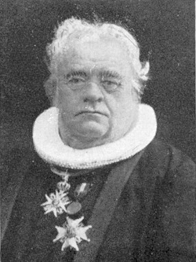 Christopher Knudsen (1843-1915)